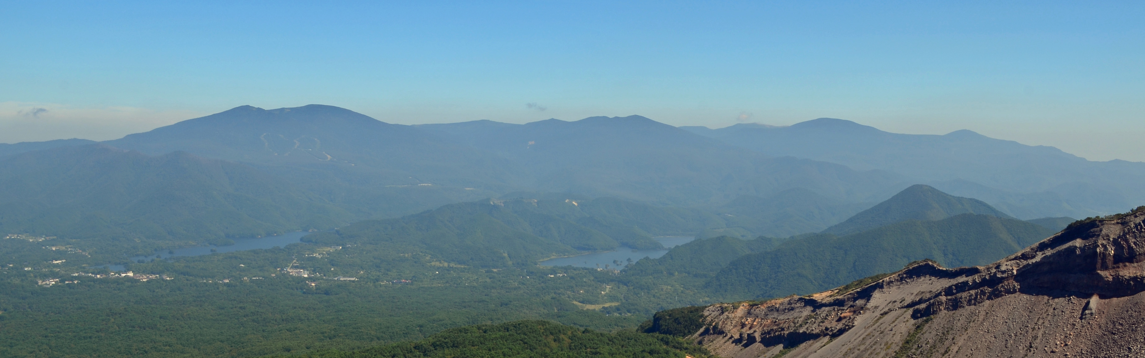 磐梯山中腹から望む吾妻連峰の全体像(名前なし)